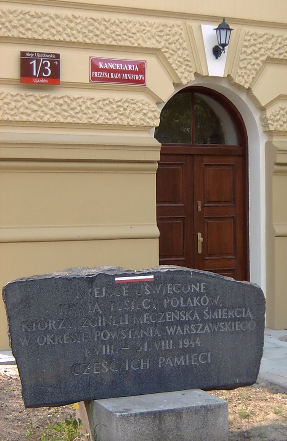 Miejsce uświęcone krwią tysięcy Polaków, którzy zginęli męczeńską śmiercią w okresie Powstania Warszawskiego 1.VIII-31.VIII.1944. Przy kancelarii Prezesa Rady Ministrów RP - Al.Ujazdowskie 1/3, Warszawa.